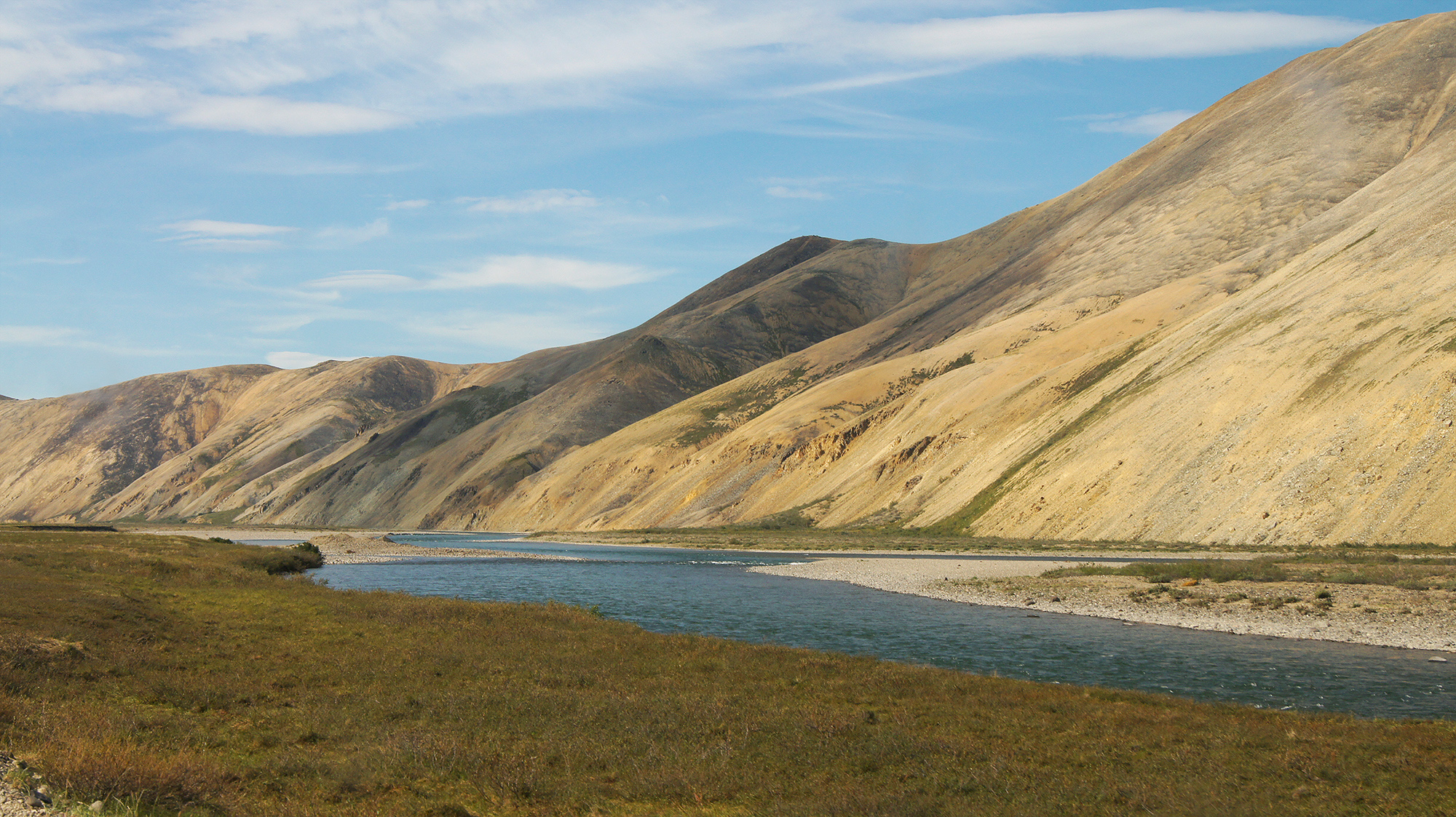 Паляваамский: Территория памятника включает пойму и горное правобережье р. Паляваам в среднем течении, выше устья р. Левтутвеем и вверх выше р. Голубой, Иультинский район, Чукотский автономный округ This image is related to the protected area of Russia number 8710025